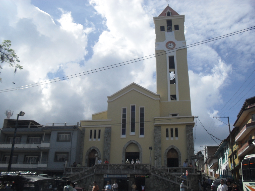 Iglesia Belen Umbria Risalada